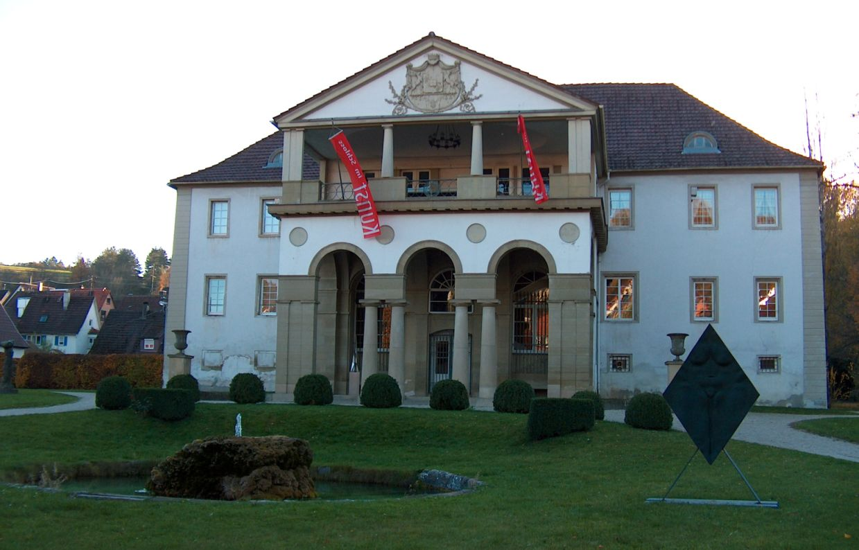 Schloß Dätzingen